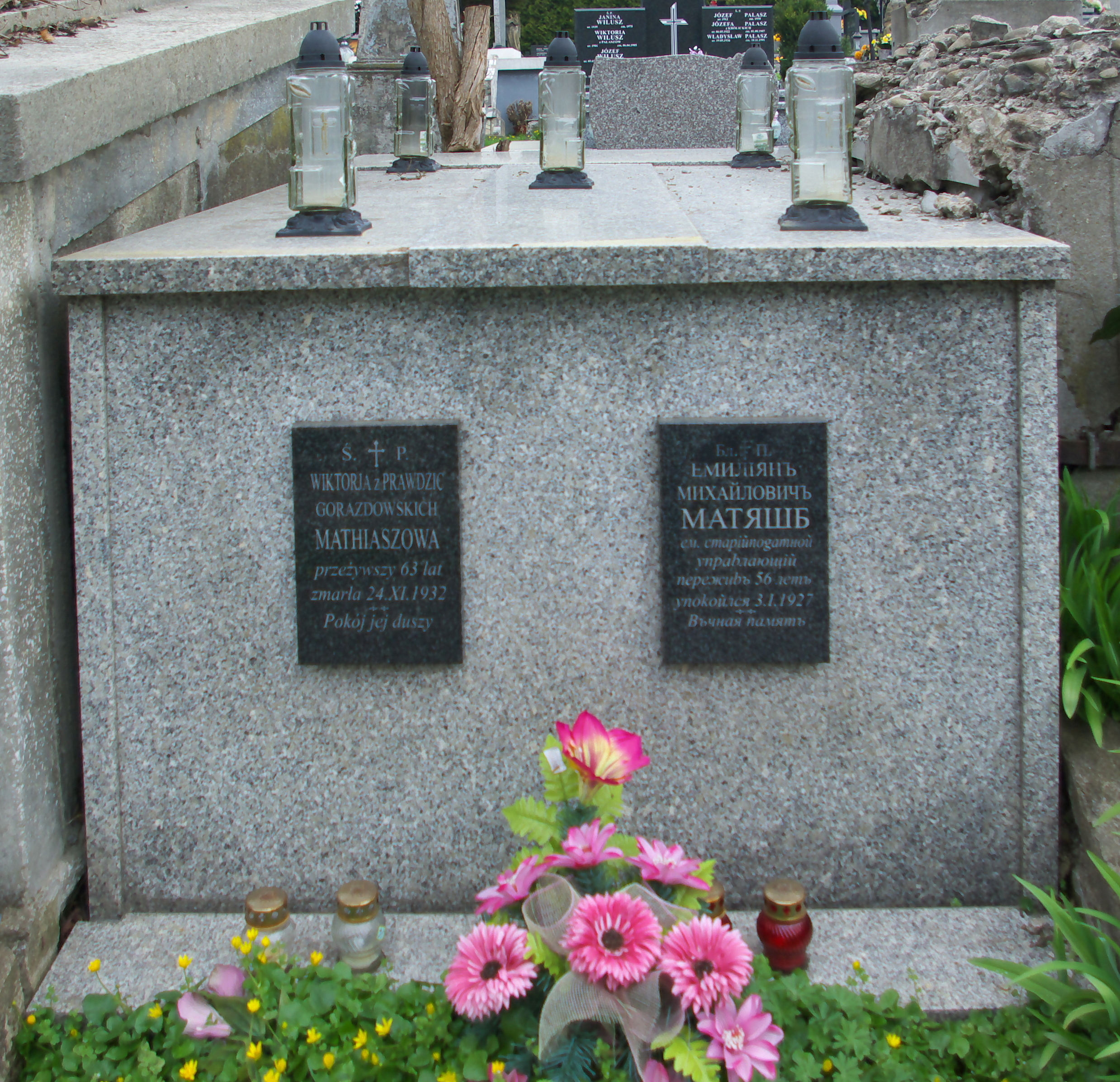 Grobowiec Emila i Wiktorii Mathiasz na Cmentarzu Centralnym w Sanoku.